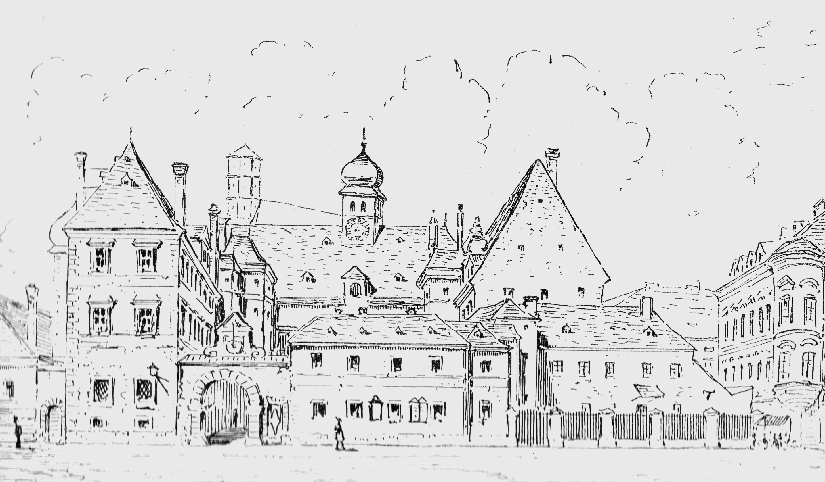 Das niederösterreichische Landhaus in der Wiener Herrengasse, vor 1838